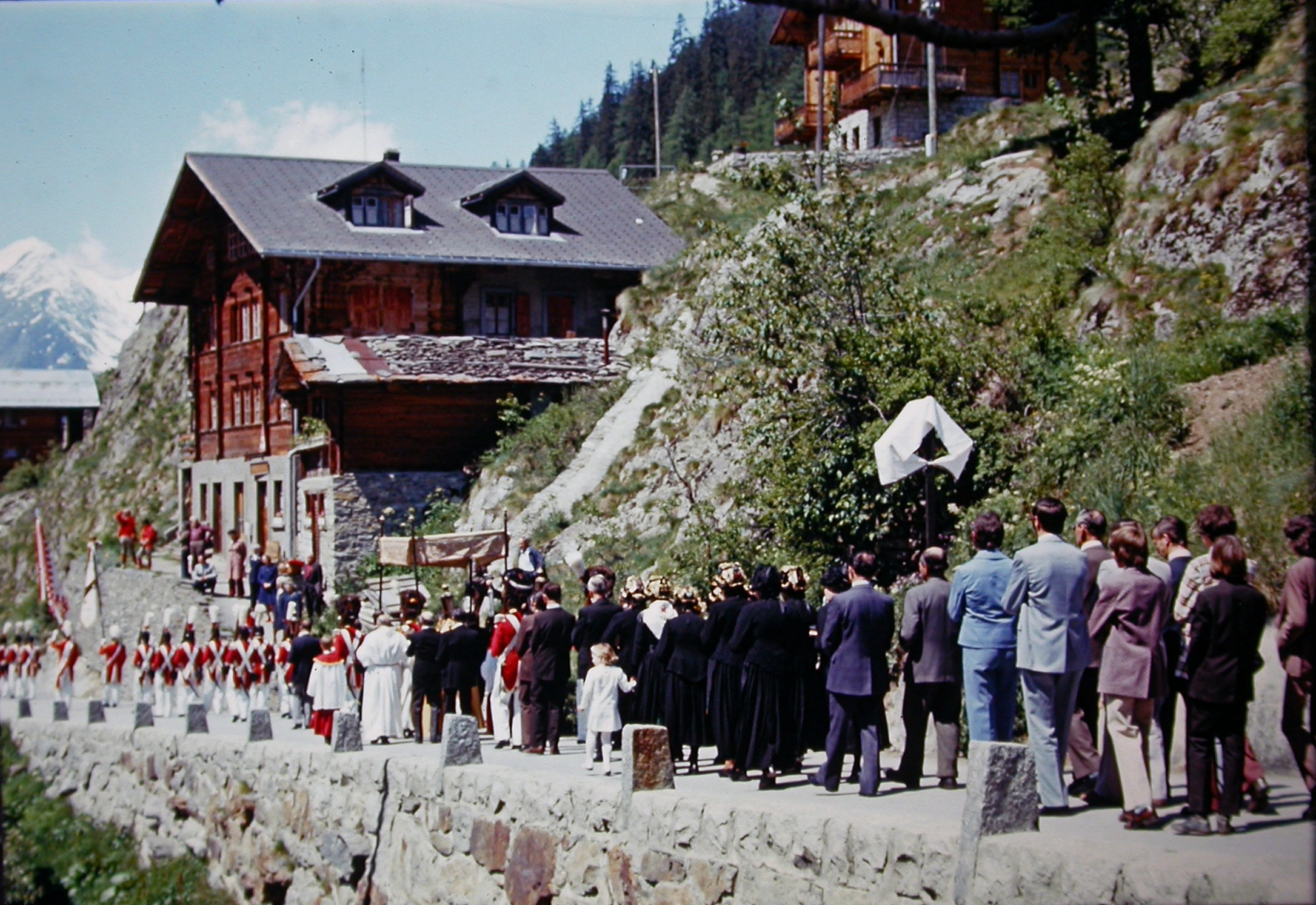 1974 Lötschental Fronleichnam